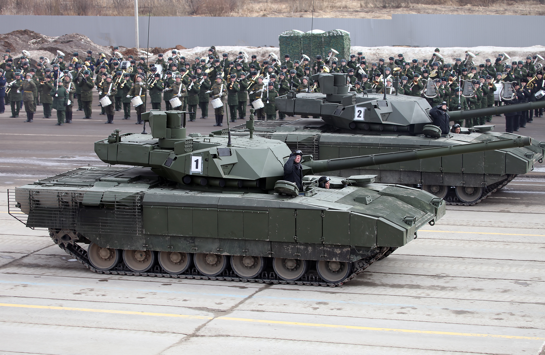 Танк Т-14 объект 148 на тяжелой гусеничной унифицированной платформе Армата (Main battle tank T-14 object 148 on heavy unified tracked platform Armata)